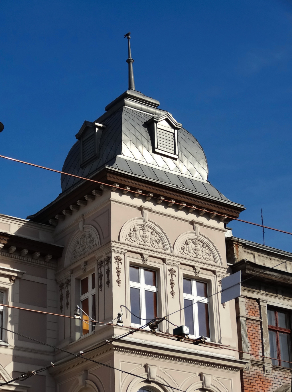 Kamienica przy ul. Gdańskiej 92-94 w Bydgoszczy (1889-1892, aut. Józef Święcicki)